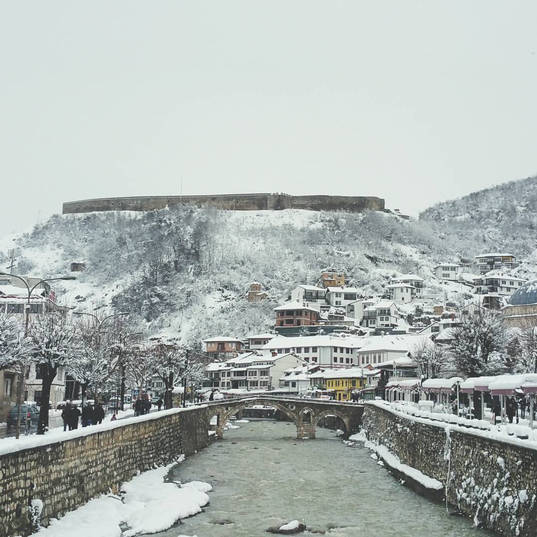 Zimní pohled na historické centrum Prizrenu a pevnost Kalaja nad ním